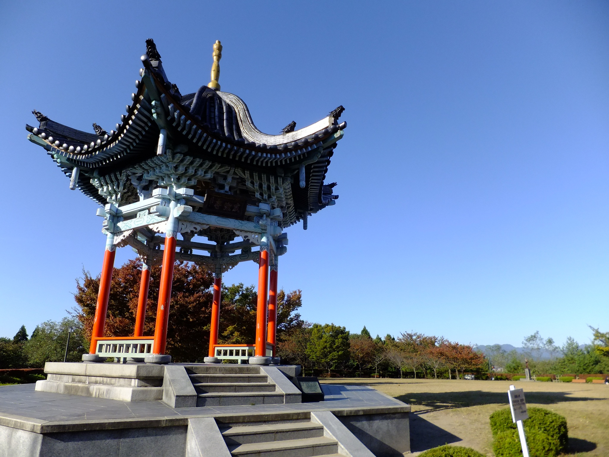 一つ森公園（秋田市）のシンボル・友誼亭。秋田市と蘭州市の姉妹都市締結5周年を記念して、蘭州市側の設計をもとに、「六角一層瓦葺」という中国の伝統的な建築様式に則って建設された。